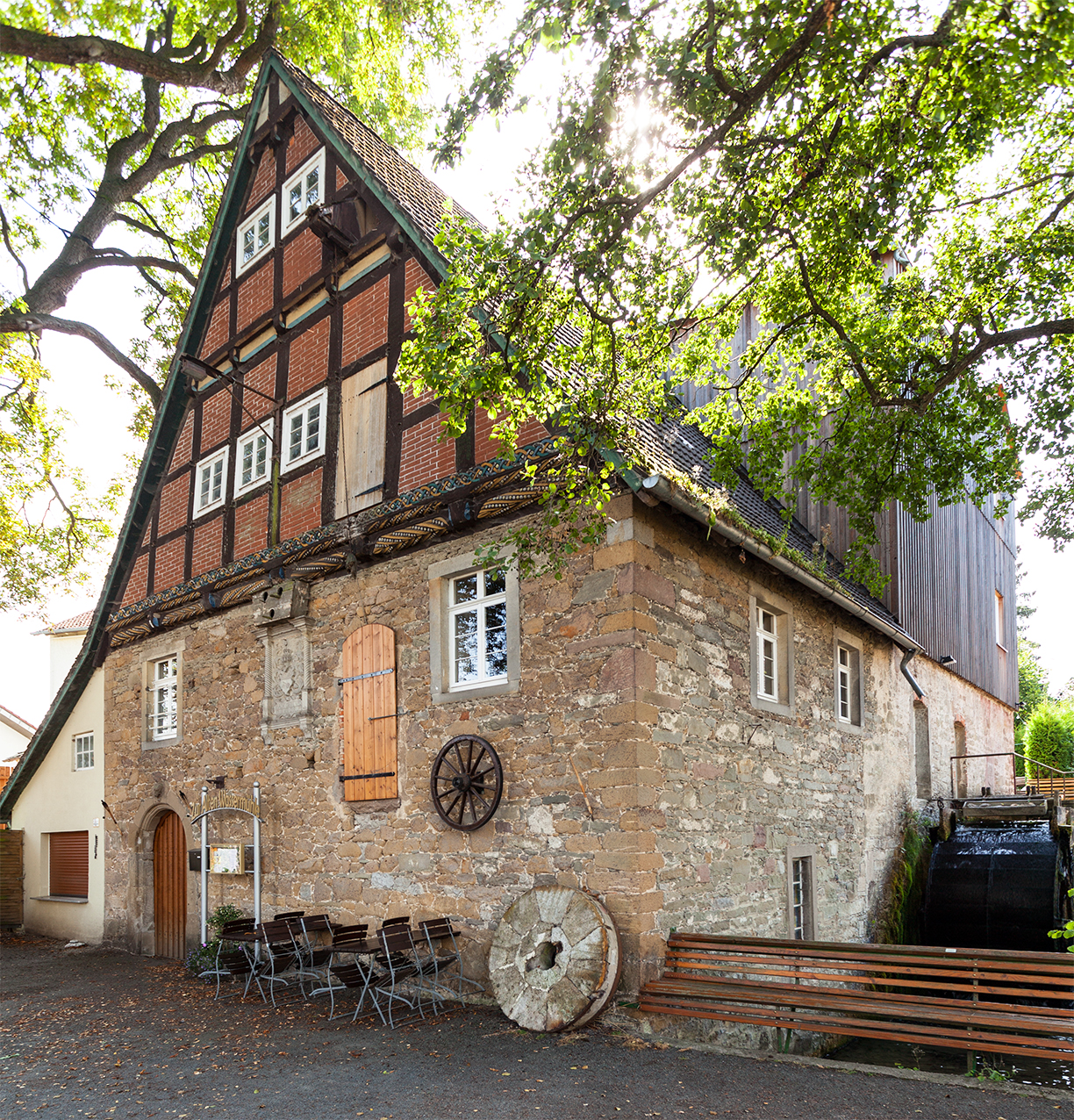 Fürstliche Erbpachtmühle von 1568 (Wassermühle) in Langenholzhausen (Kalletal) This is a photograph of an architectural monument.